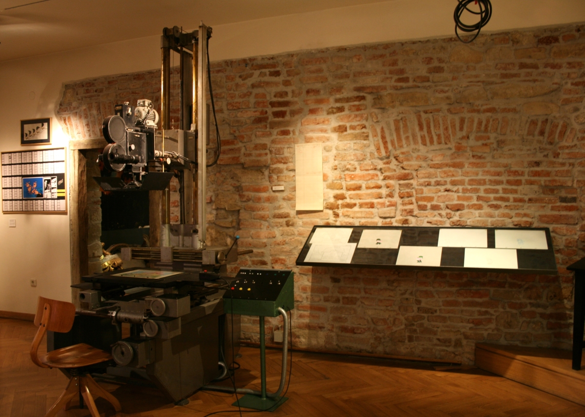 Trik kamera za snimanje crtanog filma, Zagreb film, 1956. godine. Muzej grada Zagreba